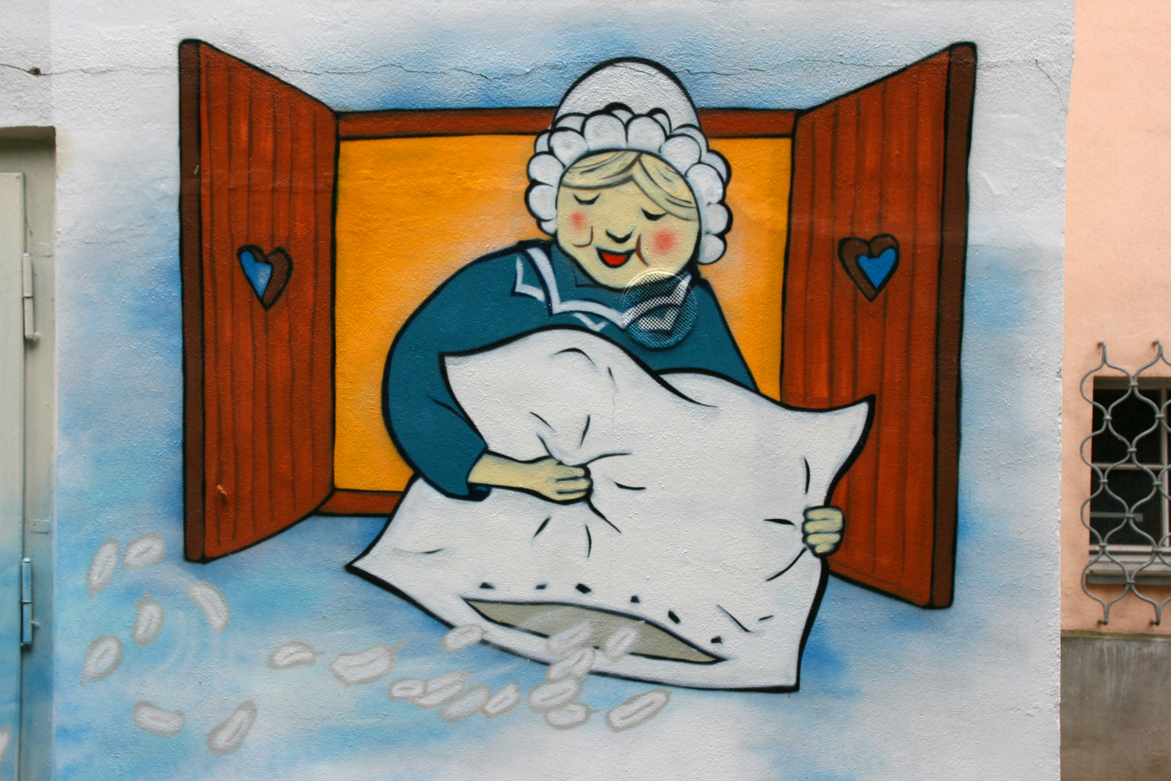 Gartenstraße in Überlingen